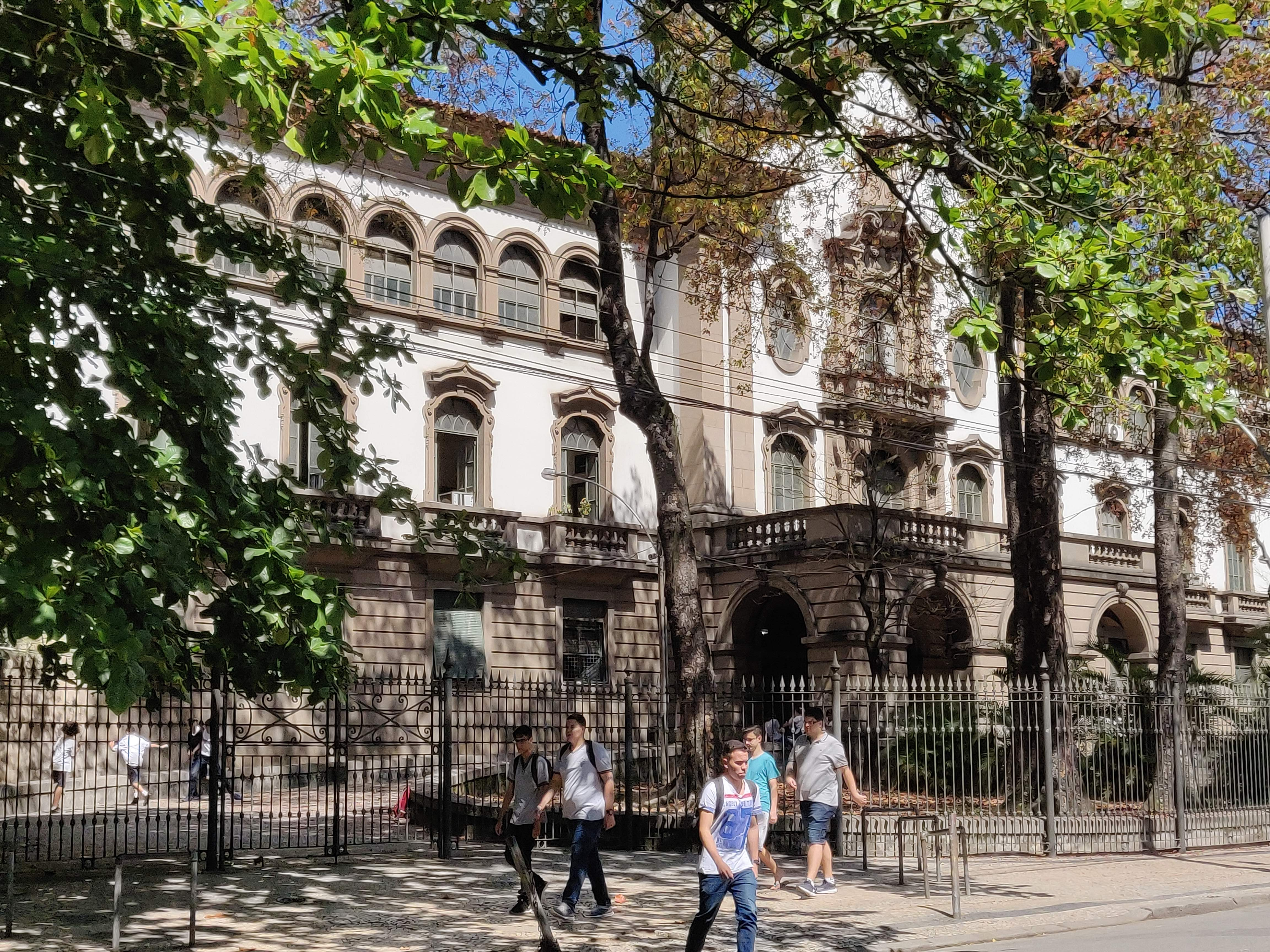 fachada do prédio principal do instituto de educação do rio de janeiro